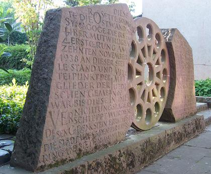 Gedenkstätte Synagoge in der Bernhard-Schwarz-Straße Die Schiersteiner Synagoge wurde am 10.11.1938 von der Wiesbadener SA zerstört